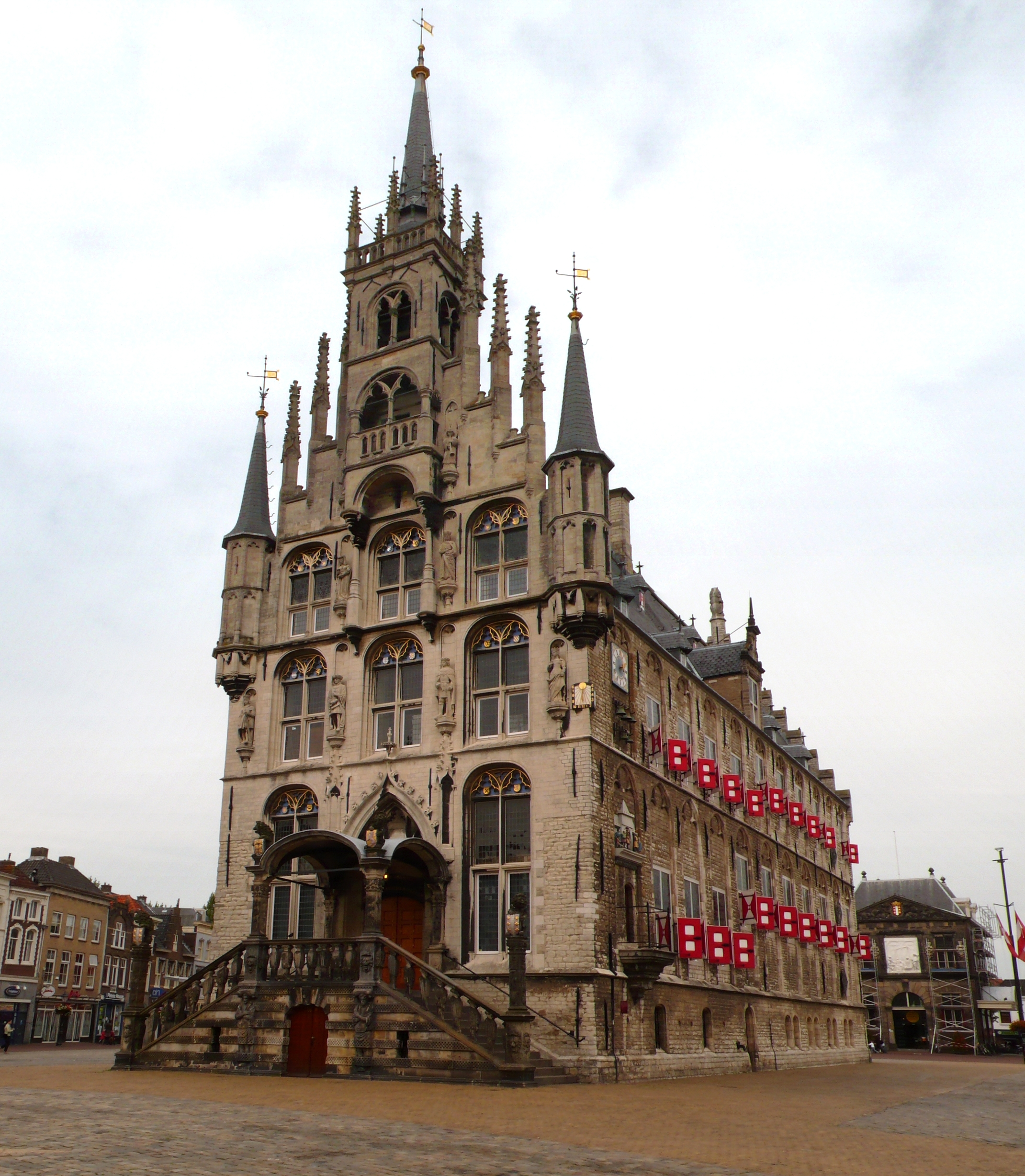 Gouda, Niederlande; Stadhuis